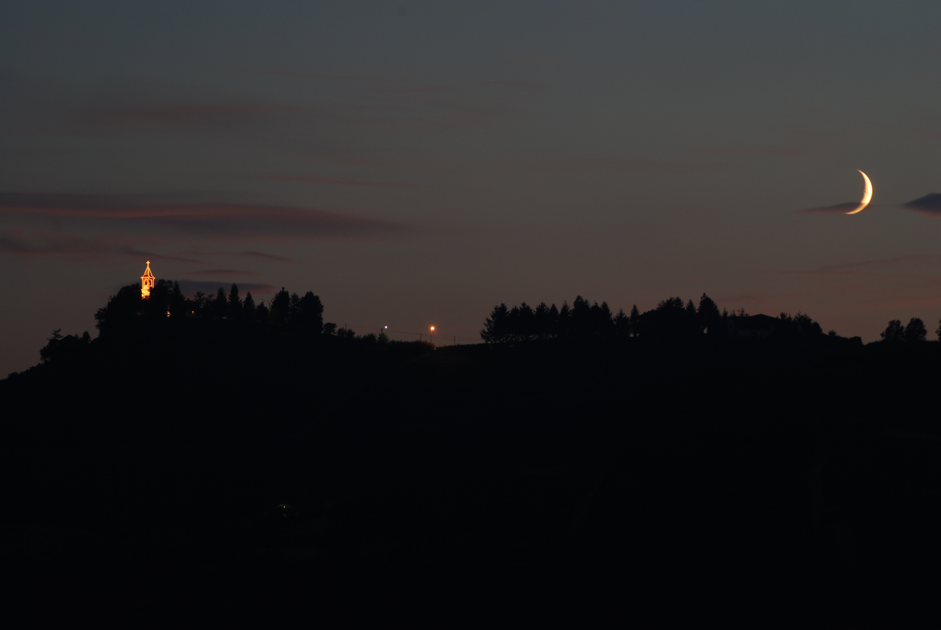 Vista del santuario dalla collina Casaroni